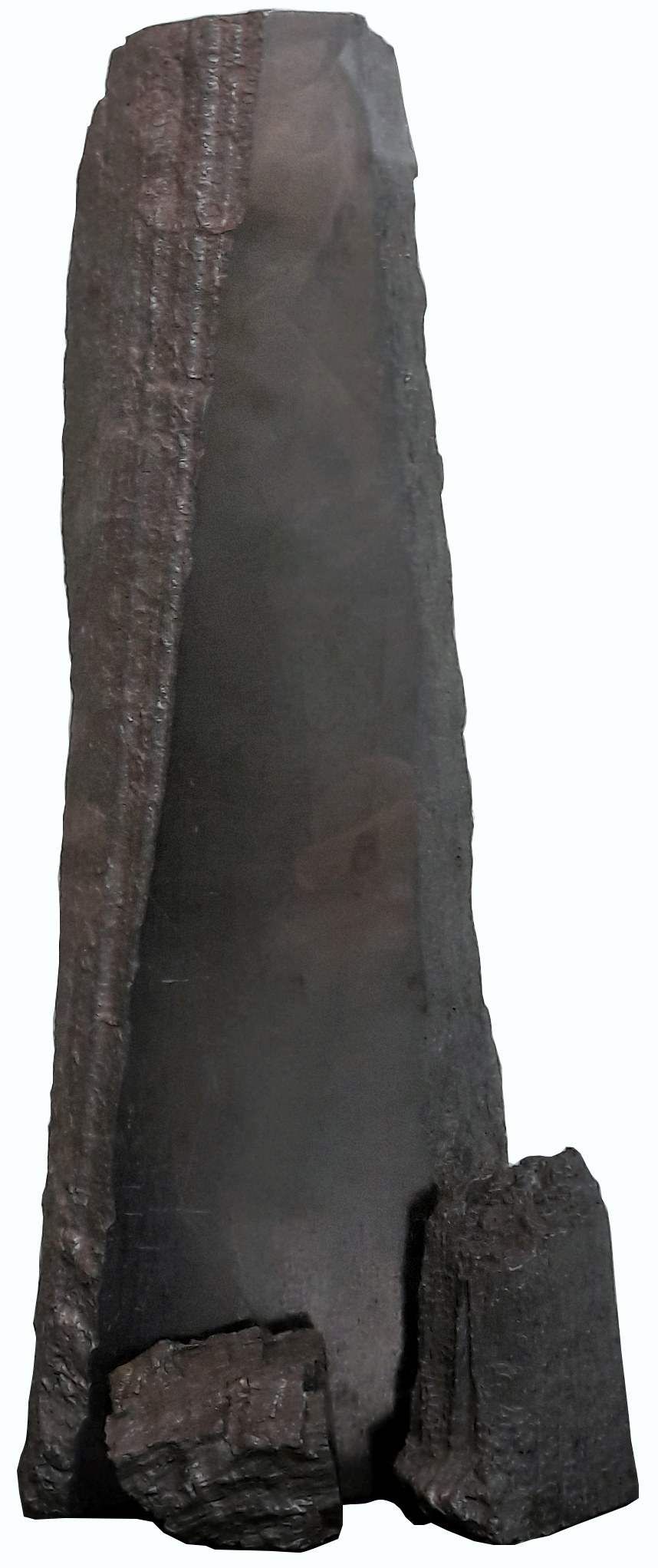 Сибирский графит И. П. Алибера, 0.37 м., 1867 года. Хранится в Геологическом музее им. В. И. Вернадского РАН.